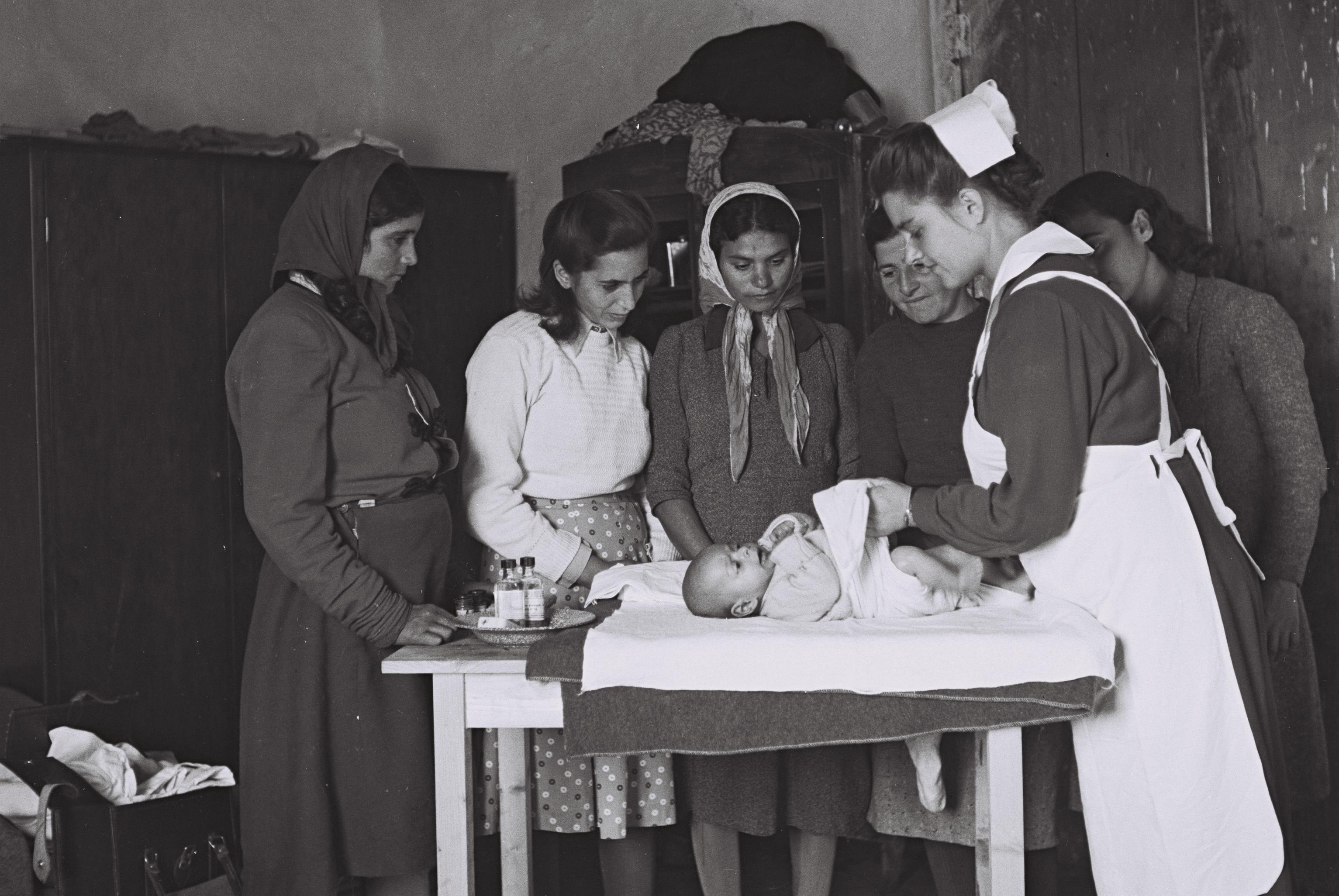 A nurse in Yehud demonstrating to young immigrant mothers how to diaper their babies (01/10/1950). אחות ביהוד מסבירה לאמהות, מהגרות צעירות , כיצד להחליף חיתול לילדיהן